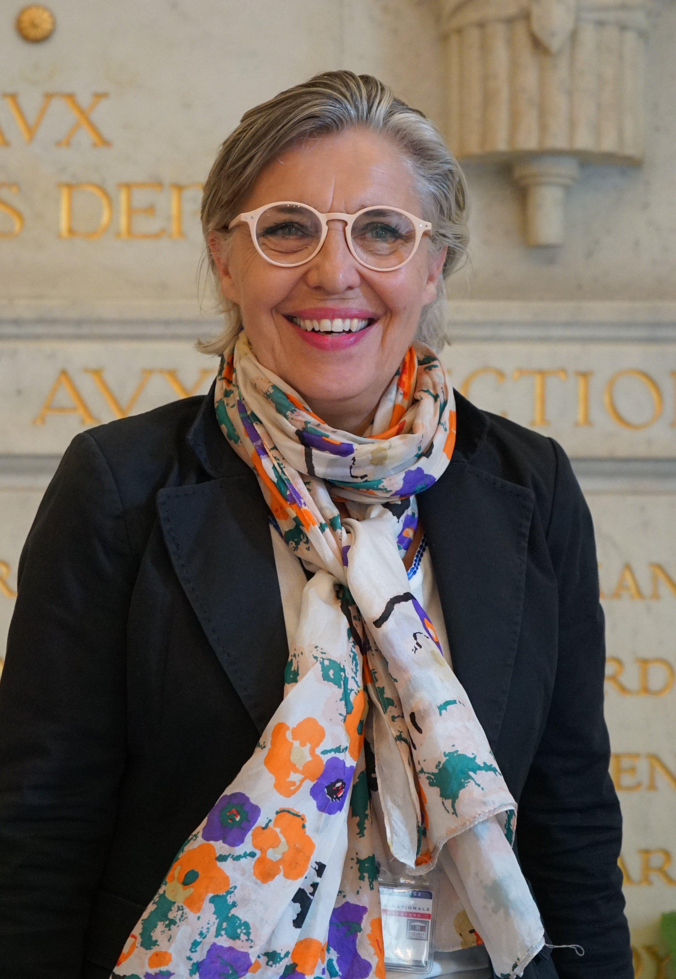 députée au Palais Bourbon.